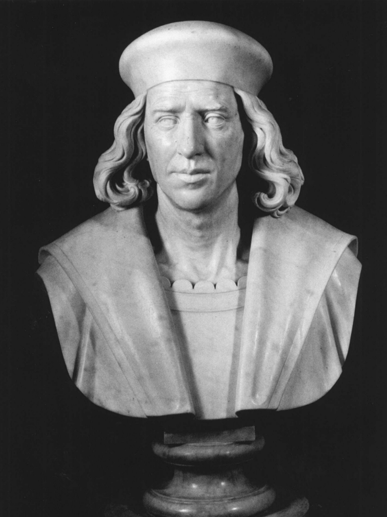 Busto di Sebastiano Caboto, opera di Antonio Bianchi (1858-1859). Il busto fa parte del Panteon Veneto, conservato presso Palazzo Loredan di Campo Santo Stefano a Venezia.